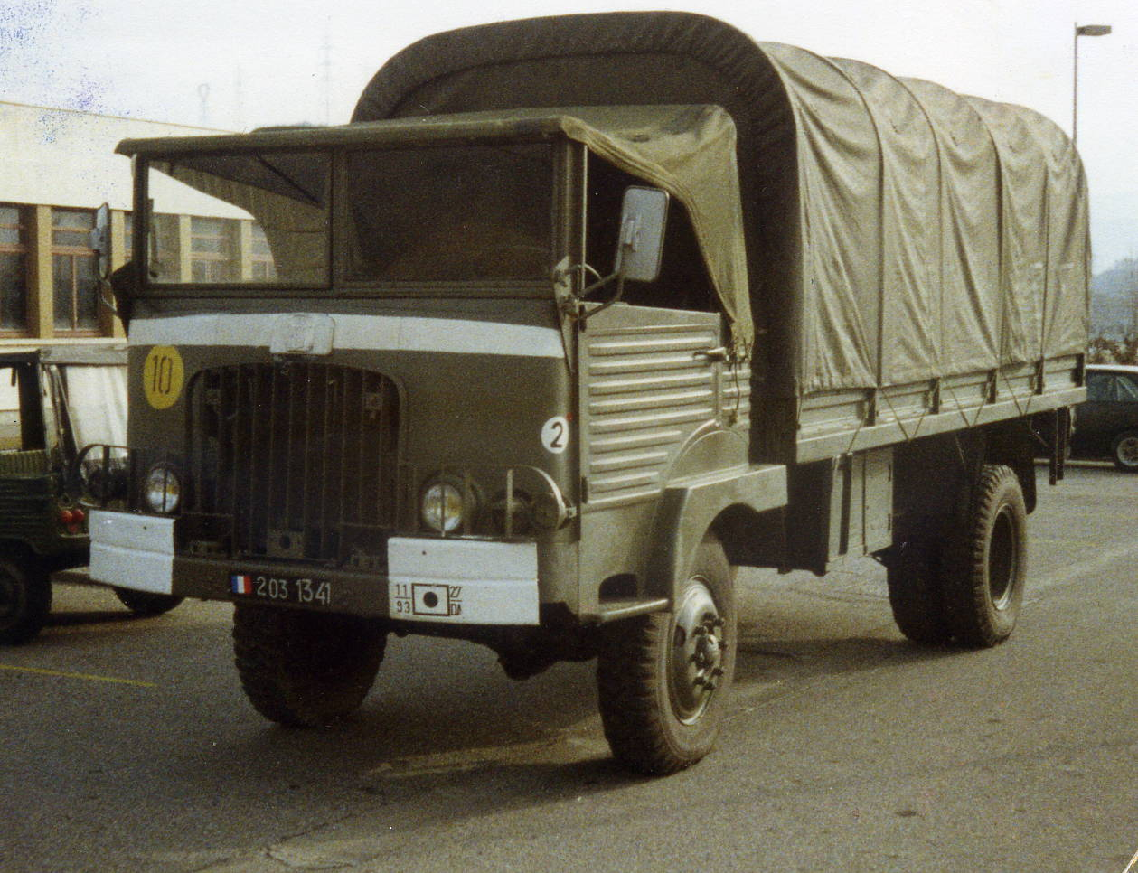 Simca Cargo 4x4 école